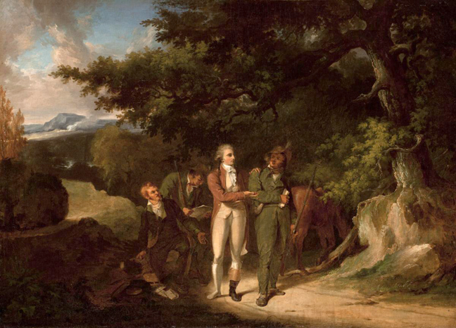 The Capture of Major Andre